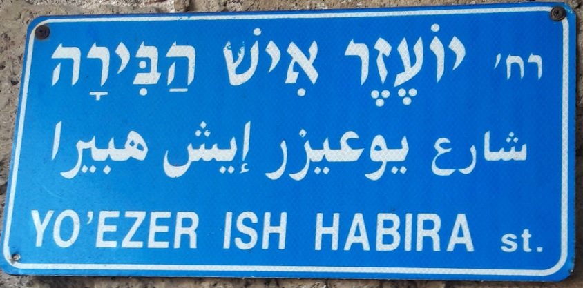 שלט רחוב על שם יועזר איש הבירה ביפו